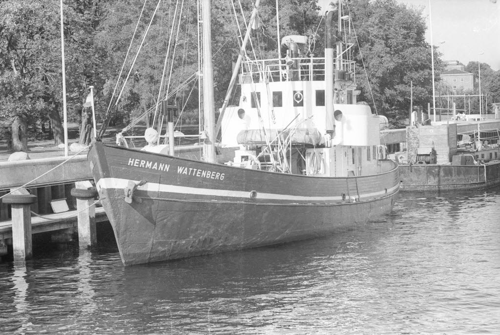 an der Kiellinie vor dem Institut für Meereskunde.